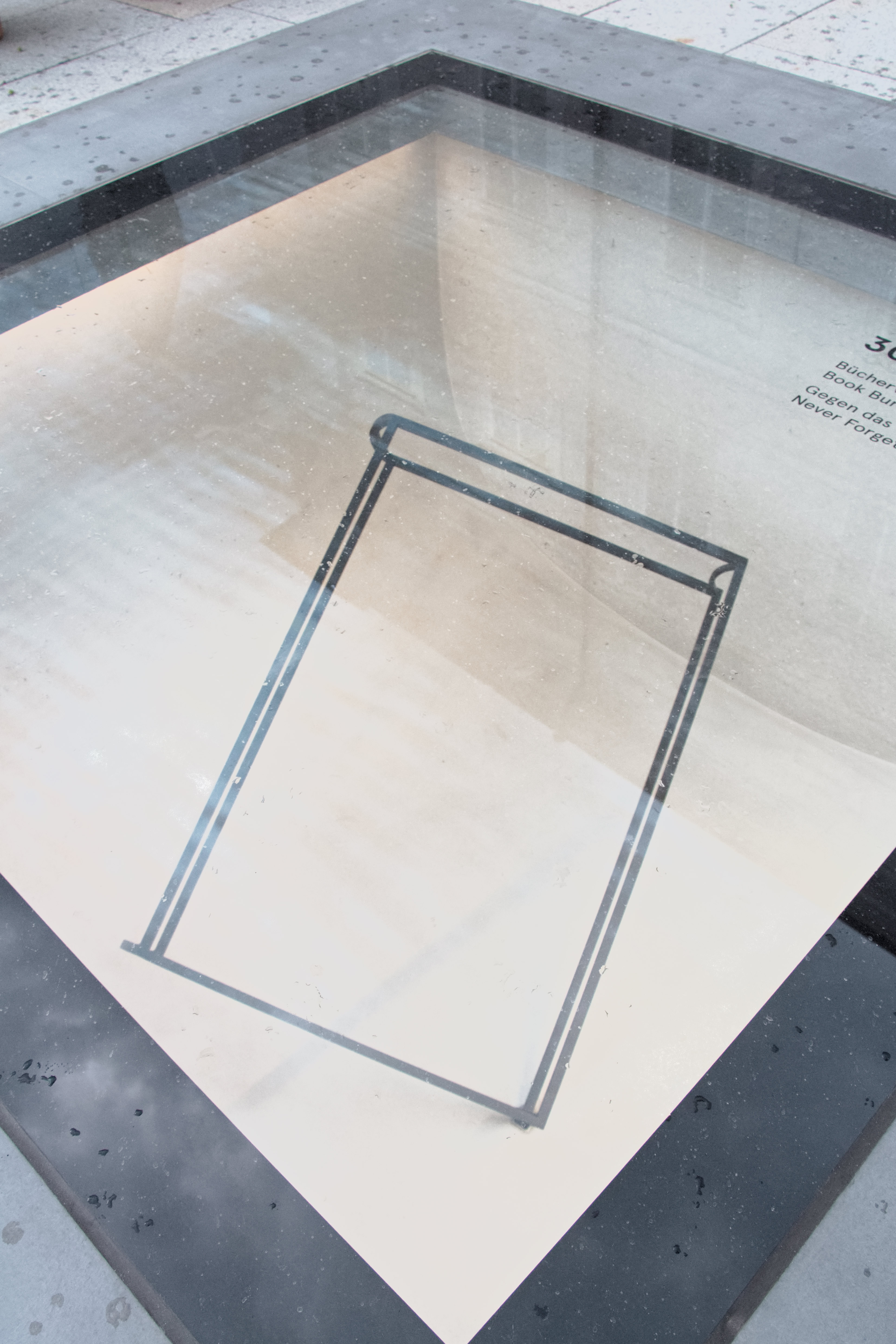 Das Mahnmal am Salzburger Residenzplatz an die Bücherverbrennung der Nazis am 30. April 1938 besteht in Form eines künstlerisch designten Bücherskeletts in einer von einer Glasplatte abgedckten quadratischen Einfassung aus Stein und einer schlichten Beschriftung.